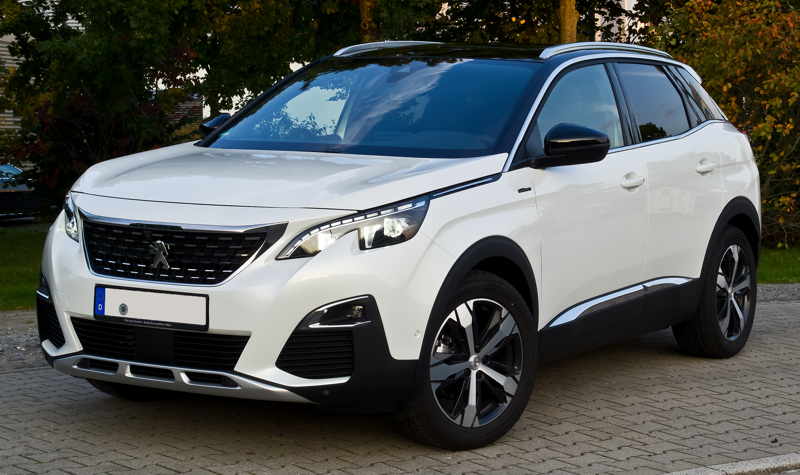 Peugeot 3008 THP 165 EAT6 Allure GT-Line (II)